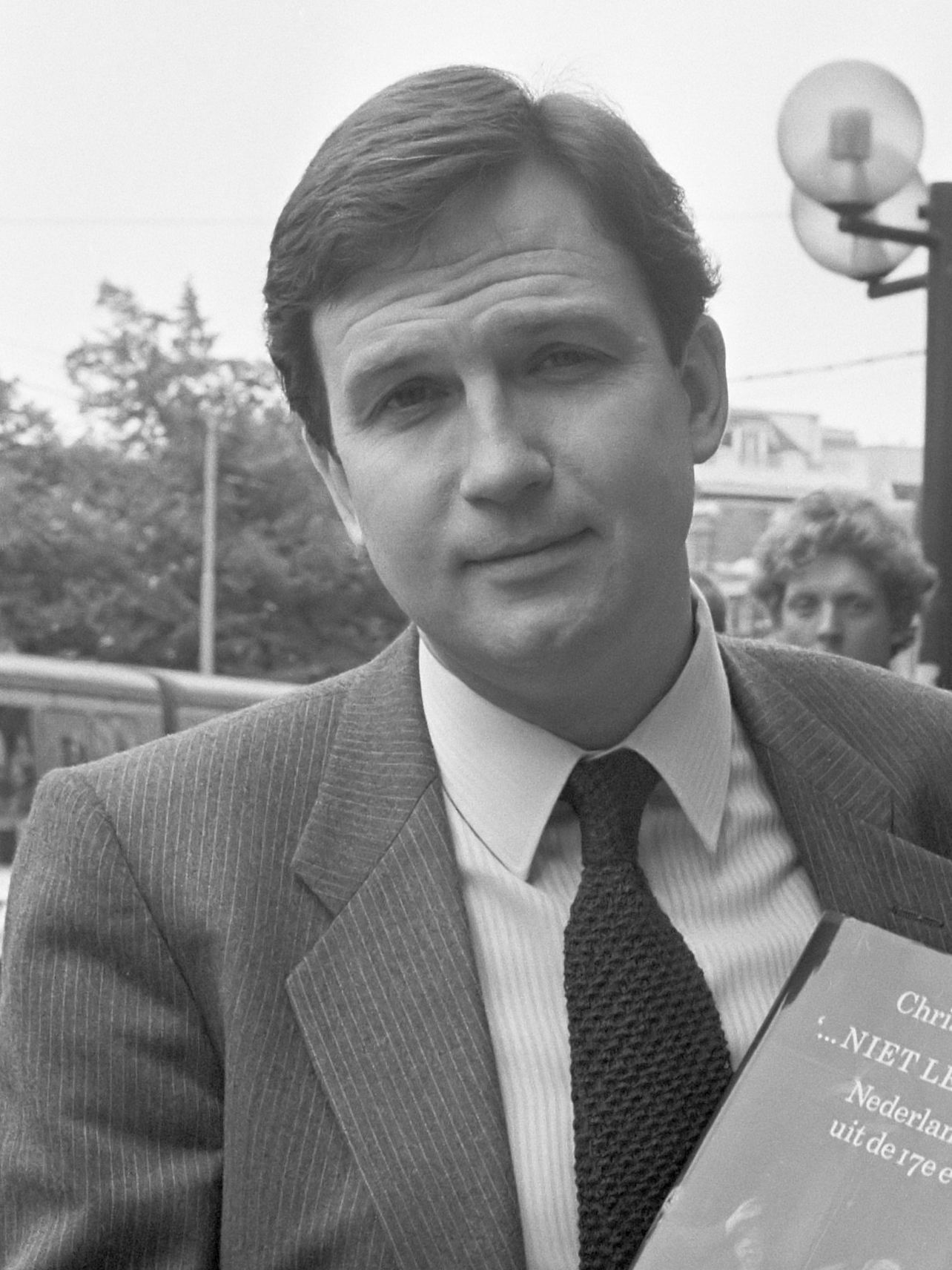 Het boek Niet Ledighs of IJdels gepresenteerd in Amsterdam auteur C. Brown met het boek 12 september 1984